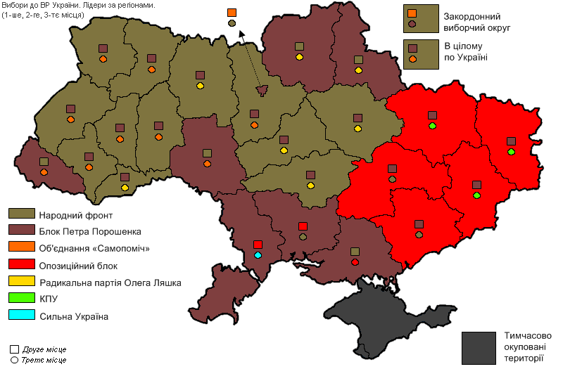 Вибори до ВРУ 2014_Лідери по областях_перше друге та третє місце